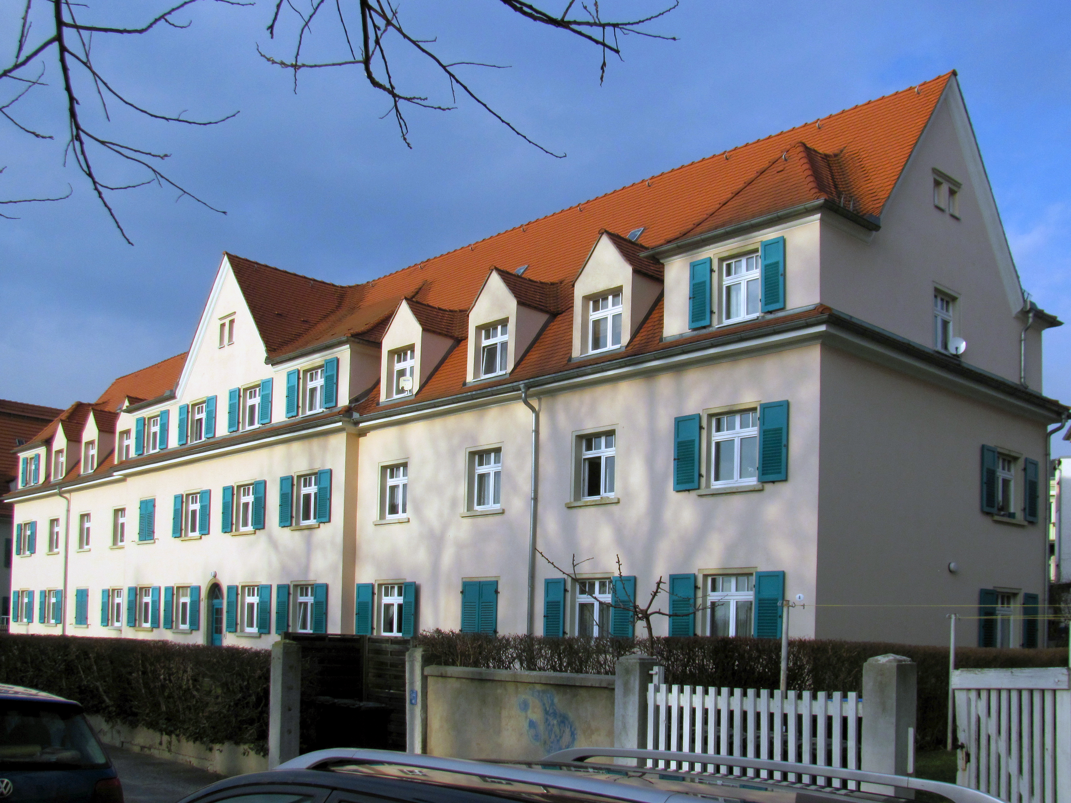 Radebeul-Serkowitz, Siedlung „Eisoldsche Häuser“, Paul-Gerhardt-Straße 4/6/8